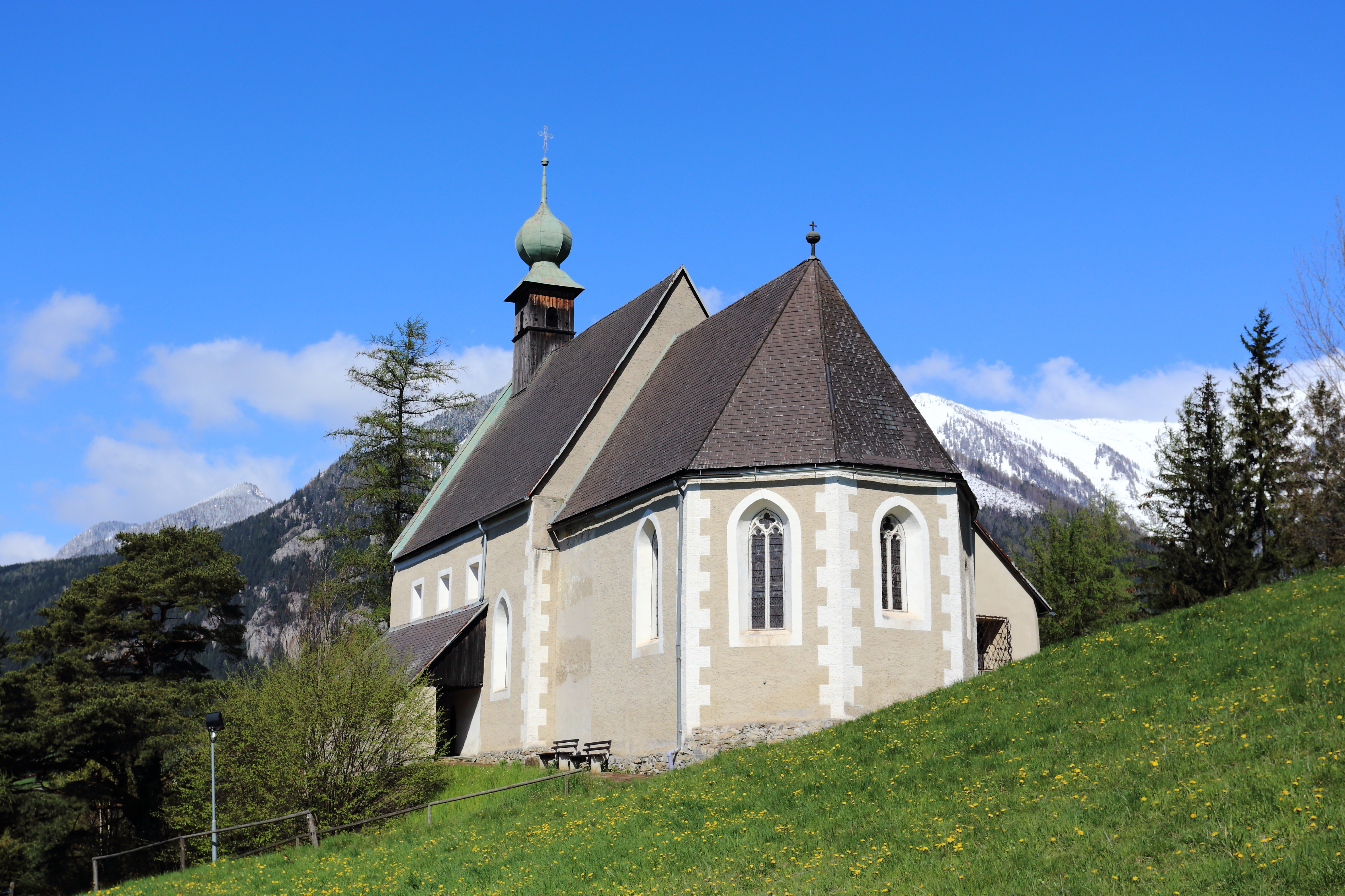 Südostansicht der Filialkirche hl. Ulrich in Seiz, ein Ortsteil der steiermärkischen Marktgemeinde Kammern im Liesingtal.